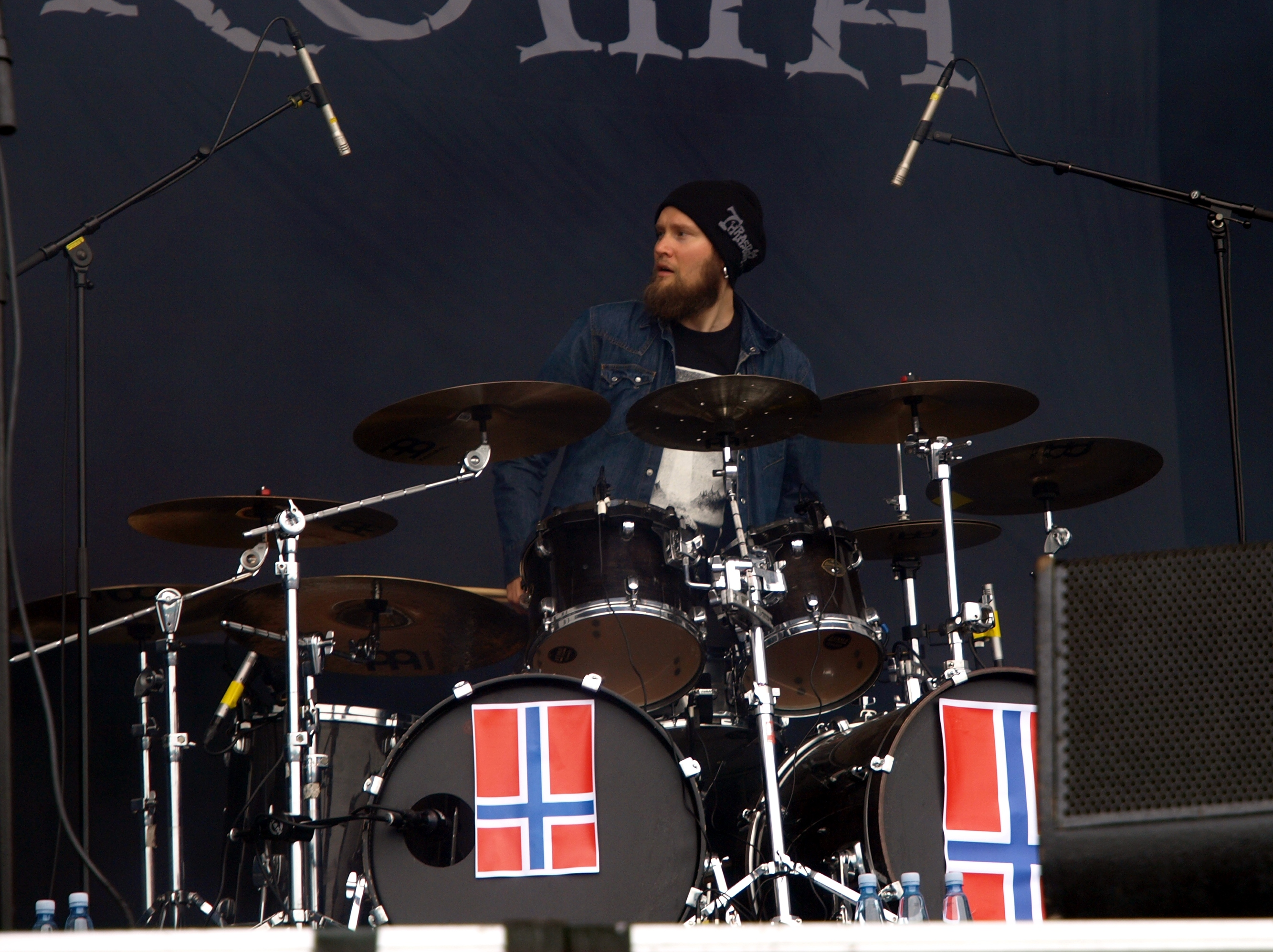 Mokoma live am Myötätuulirock 2011